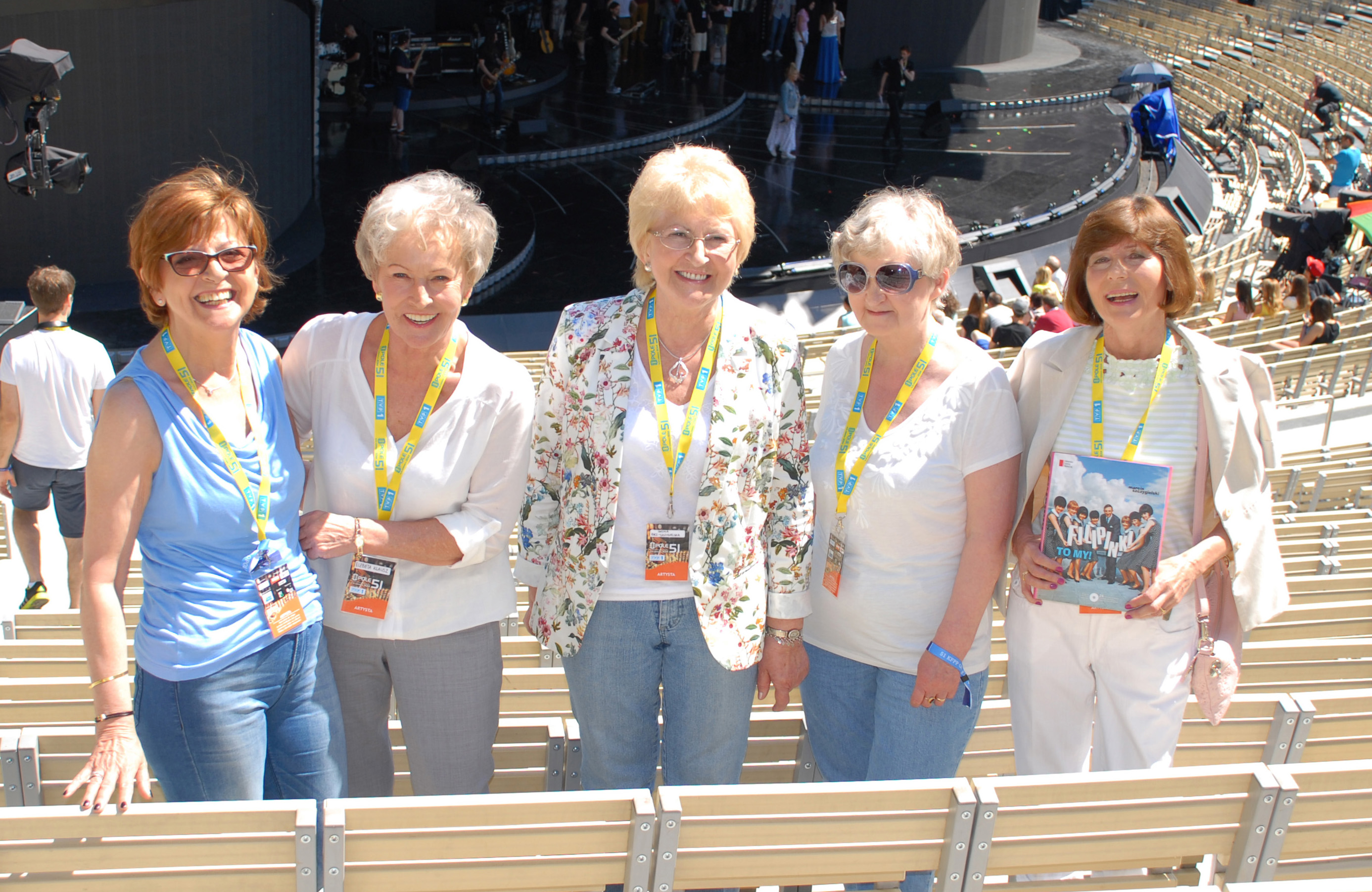 Filipinki w opolskim amfiteatrze podczas próby jednego z koncertów 51. Krajowego Festiwalu Polskiej Piosenki